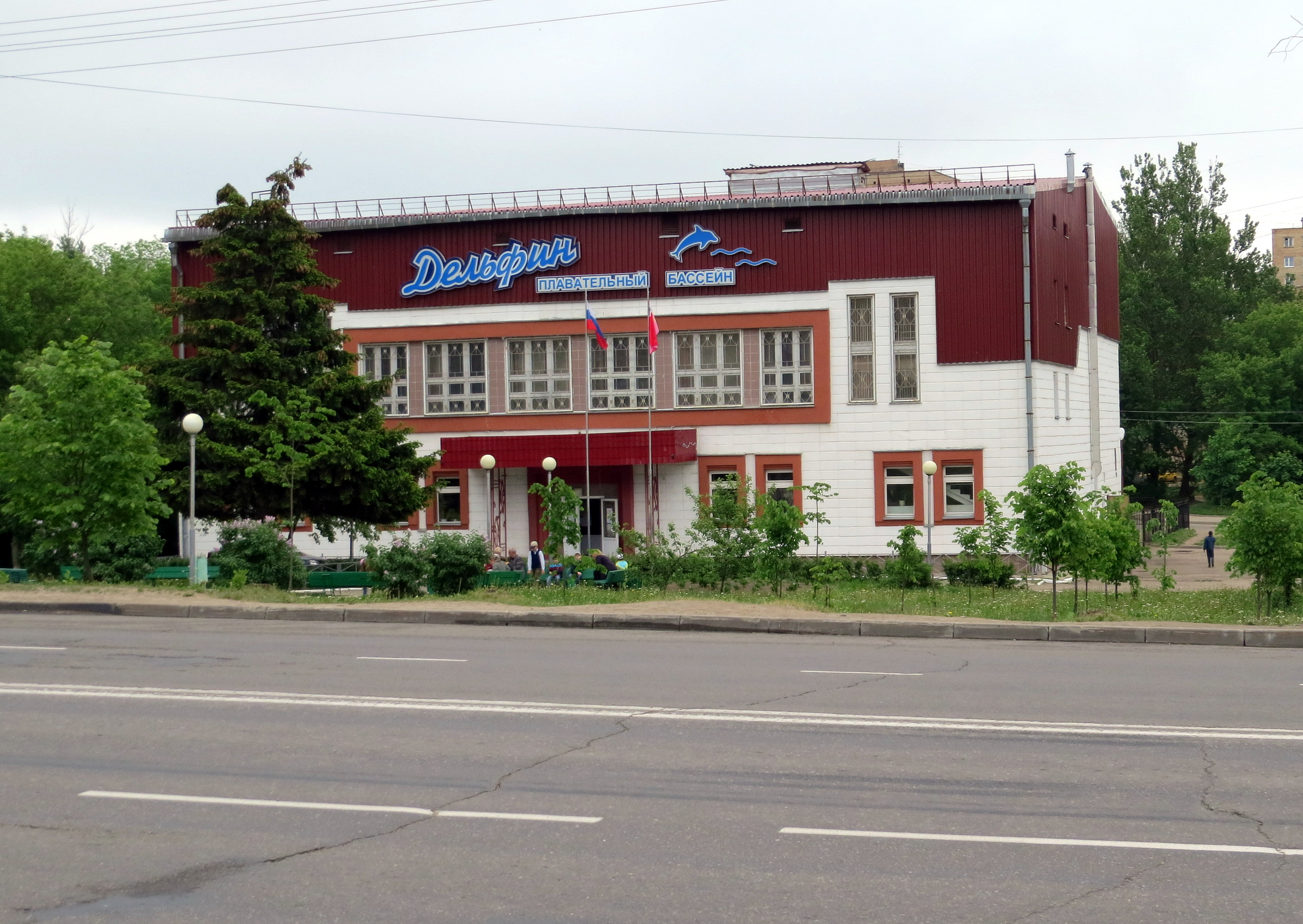 Бассейн